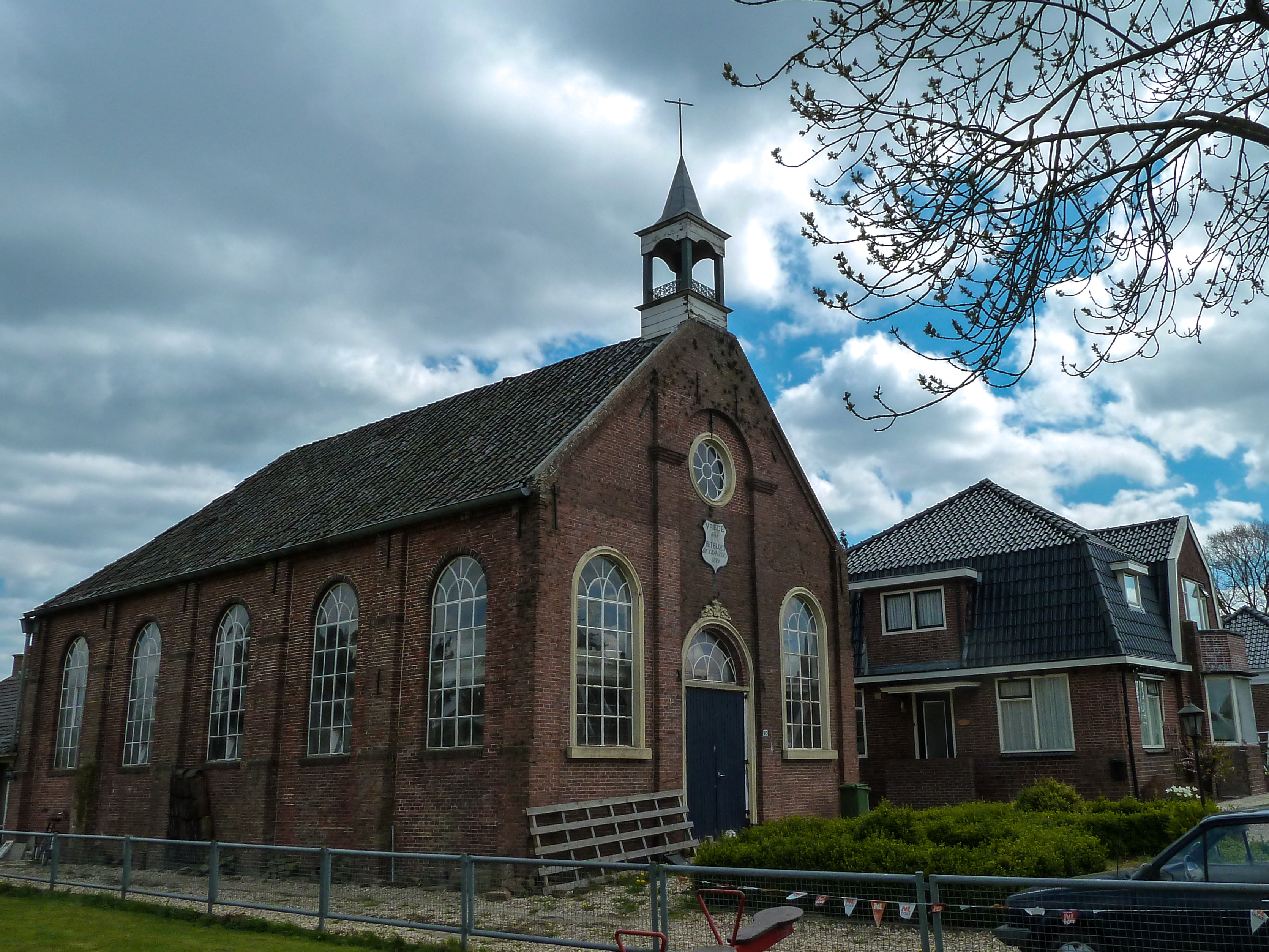 Voormalige gereformeerde kerk en pastorie van Overschild